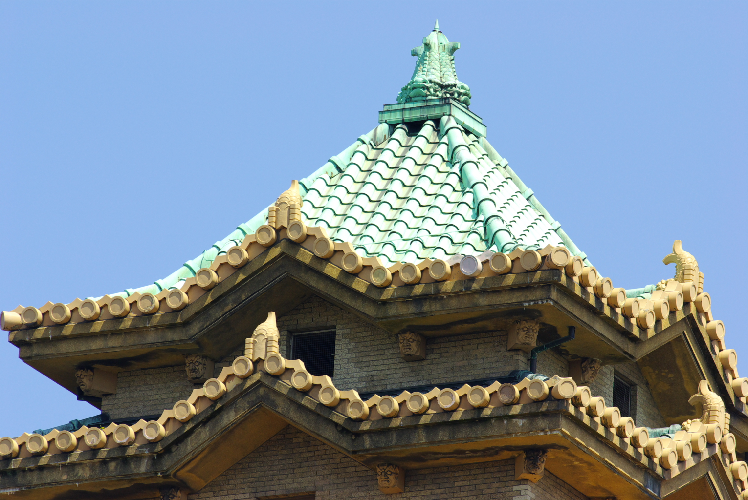 名古屋市役所の屋根の意匠